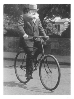 John Boyd Dunlop en bicicleta (hacia 1915)